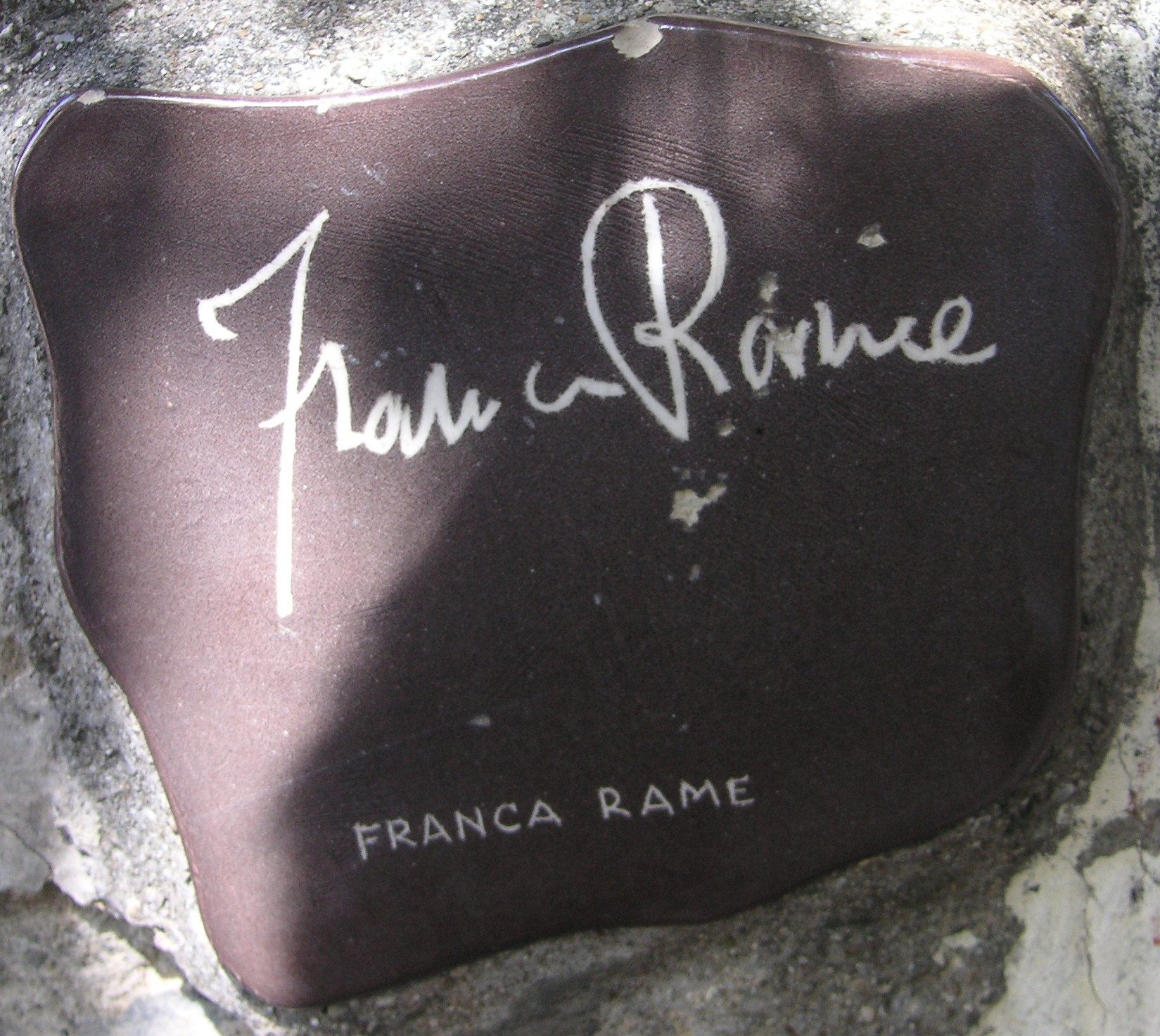 Piastrella autografata da Franca Rame sul muretto di Alassio